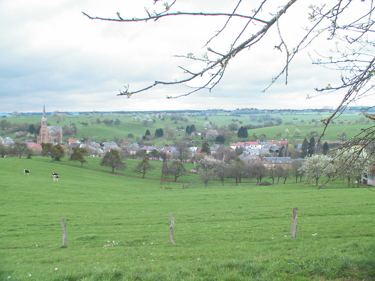 Matton-Clémency (Ardennes, France) vue générale depuis la roue des Deux-Villes Photo prise par F5ZV en avril 2005 Copyright : licence GFDL F5ZV